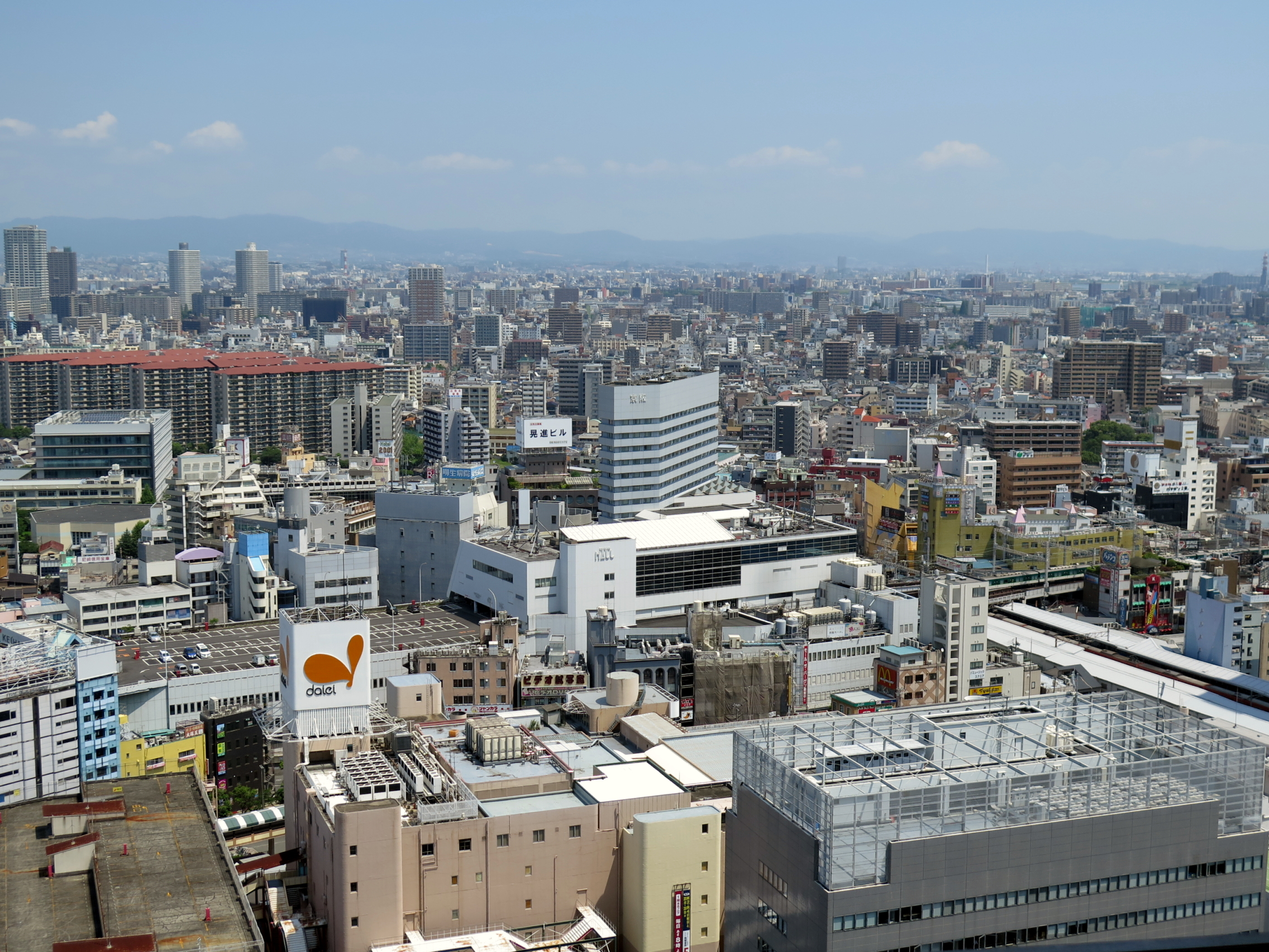 Jōtō-ku, Osaka